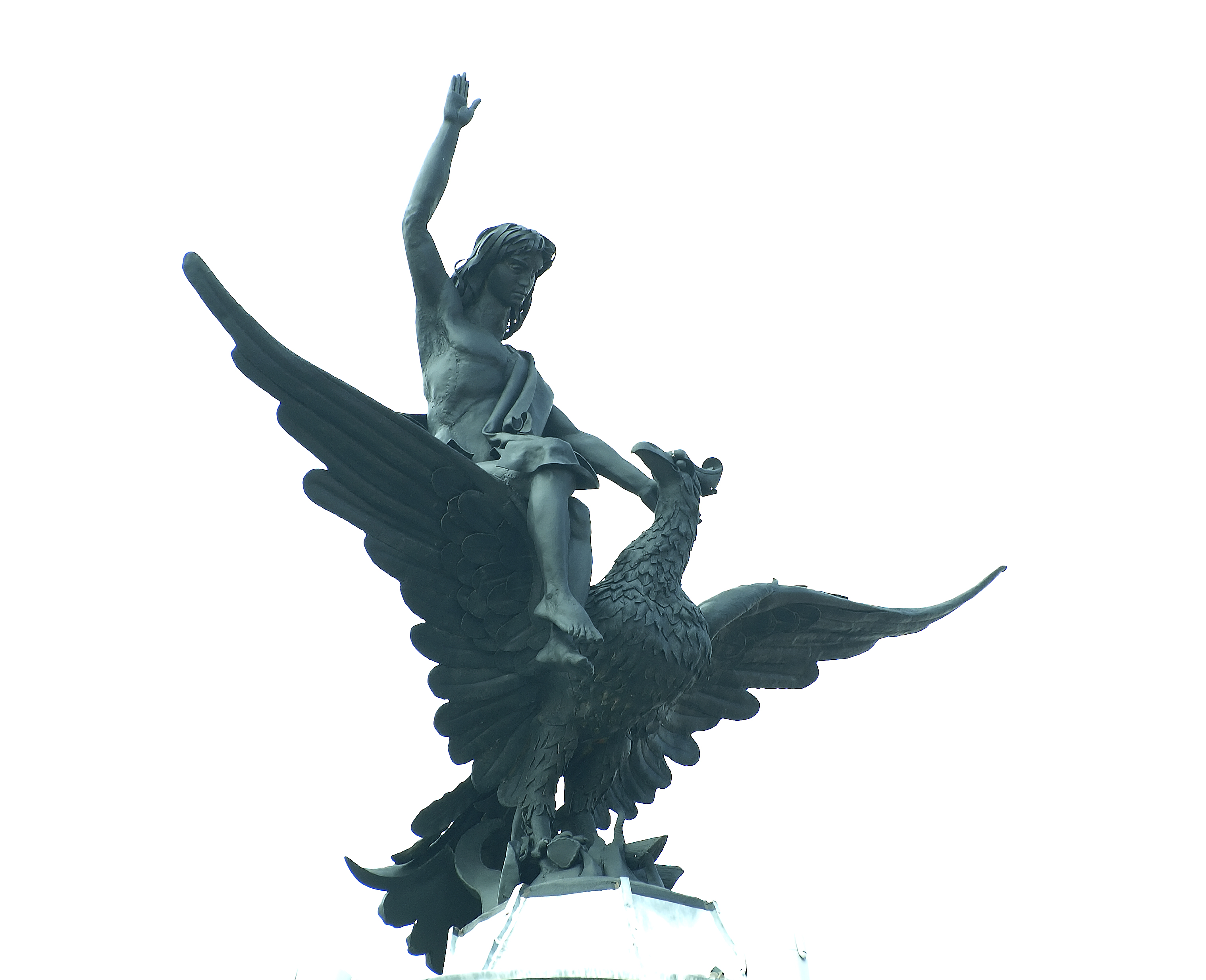 El Fénix. Edificio La Unión y el Fénix. Plaza del Altozano. Centro. Albacete